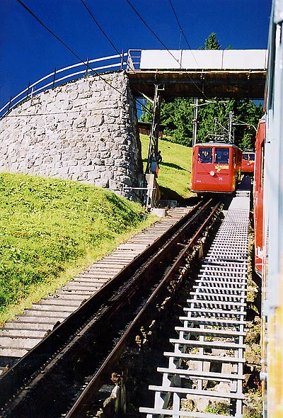 Zahnradbahn Alpnach-Pilatus, Schweiz